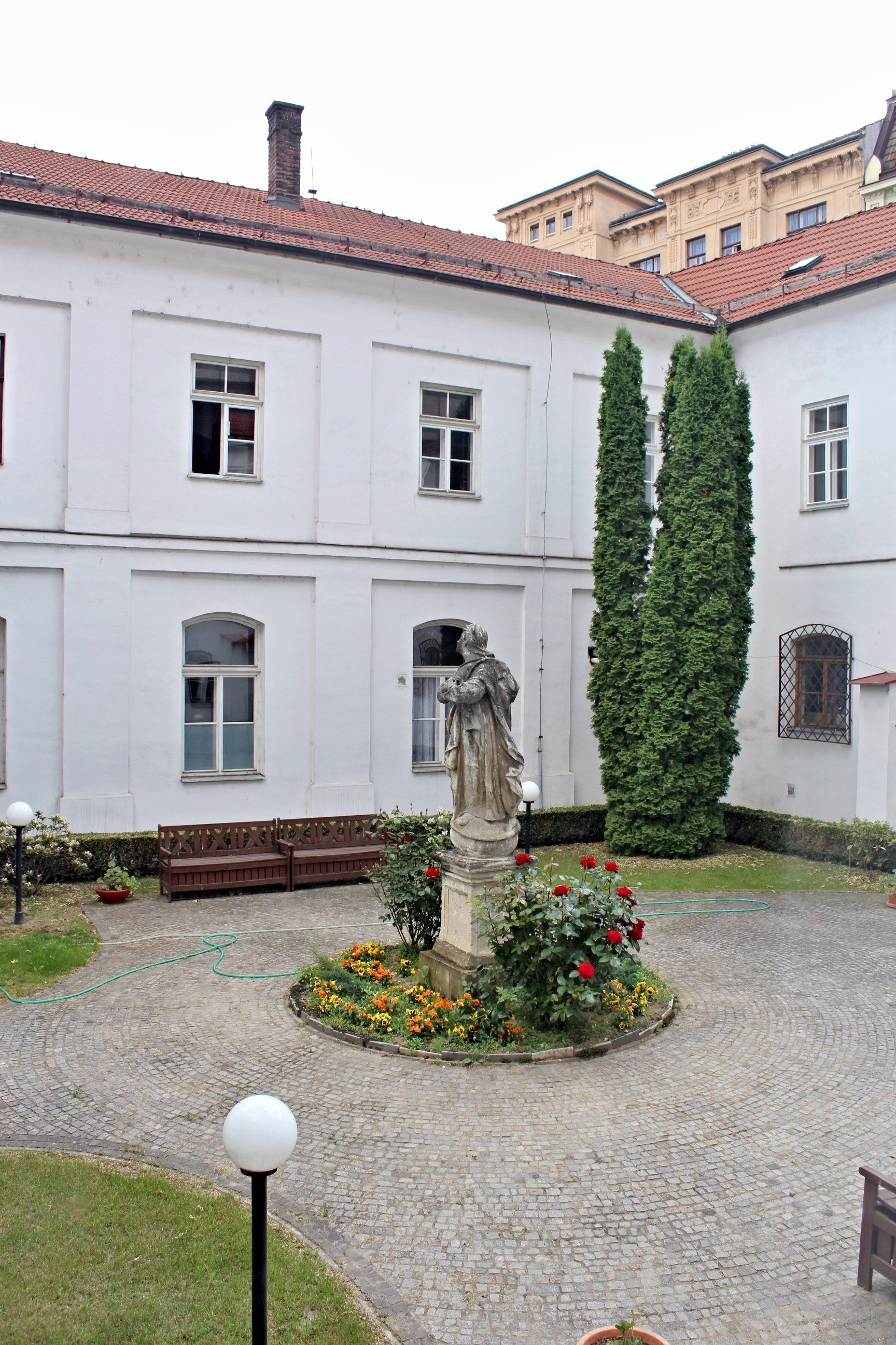 Minoritský klášter v Brně